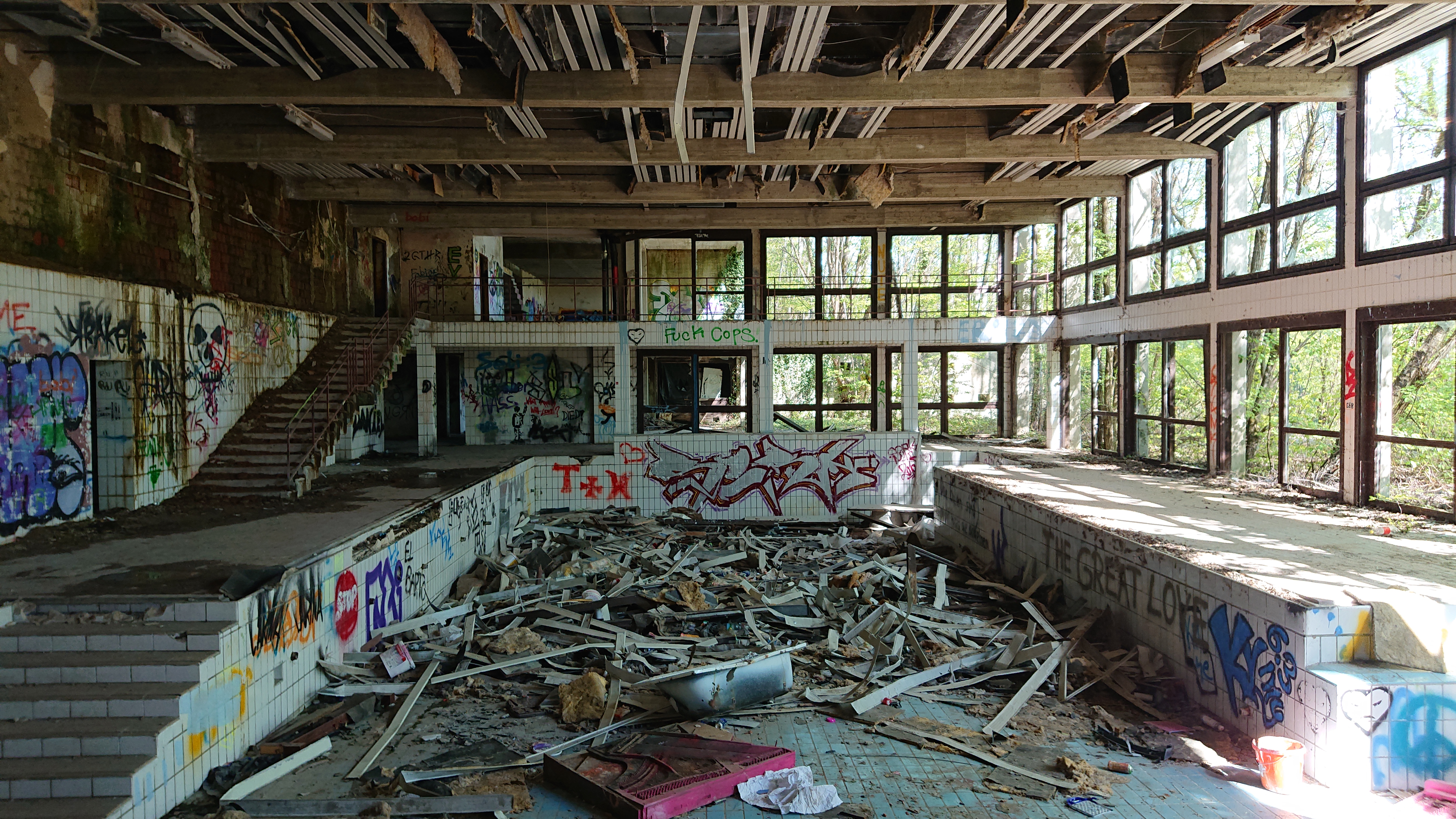 Innenansicht Altes Schwimmbad auf der Laßnitzhöhe, Steiermark. Einstellung der Bauarbeiten 1974, wegen Geldmangels nie eröffnet.